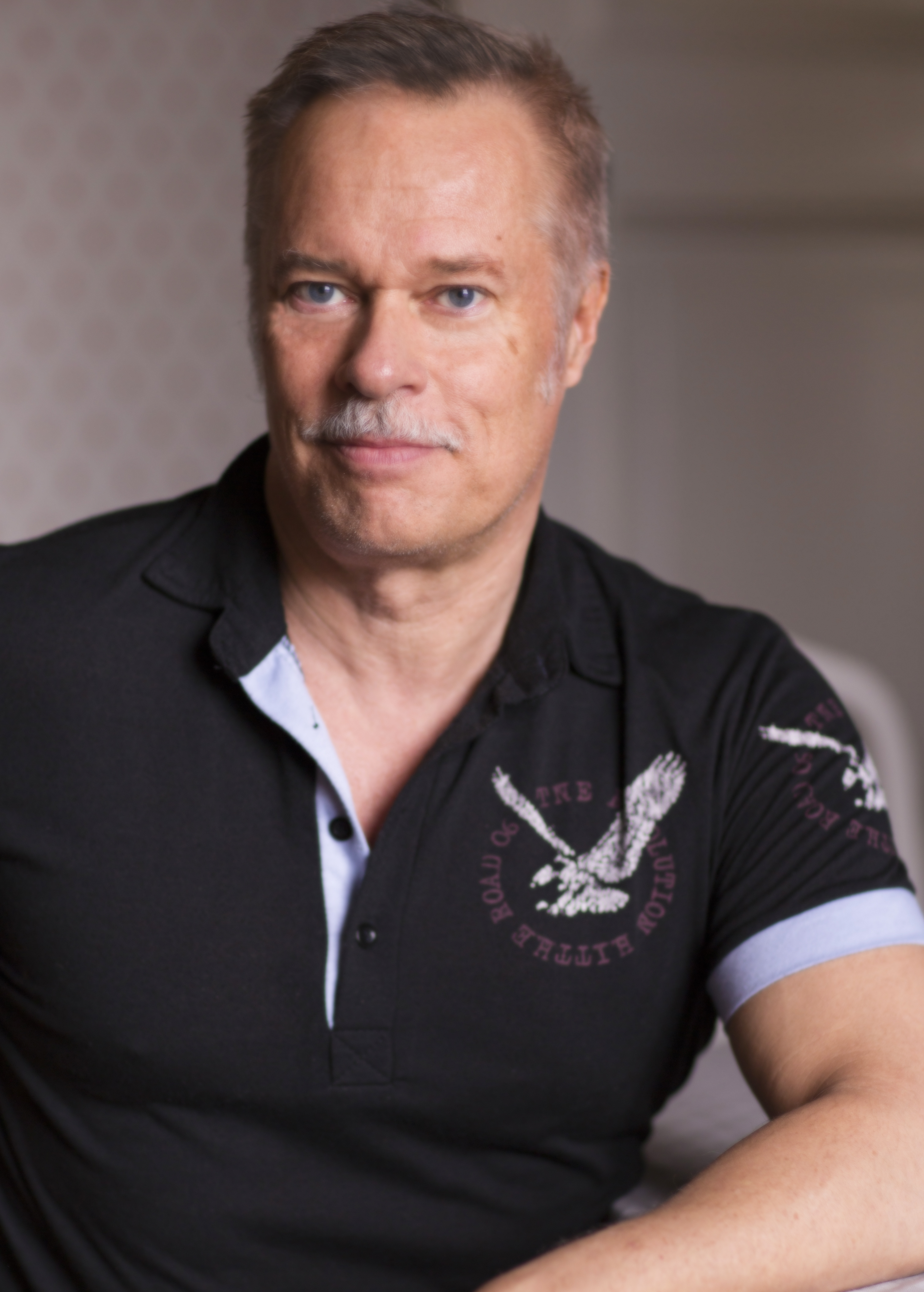 Hans Marklund, regissör och koreograf